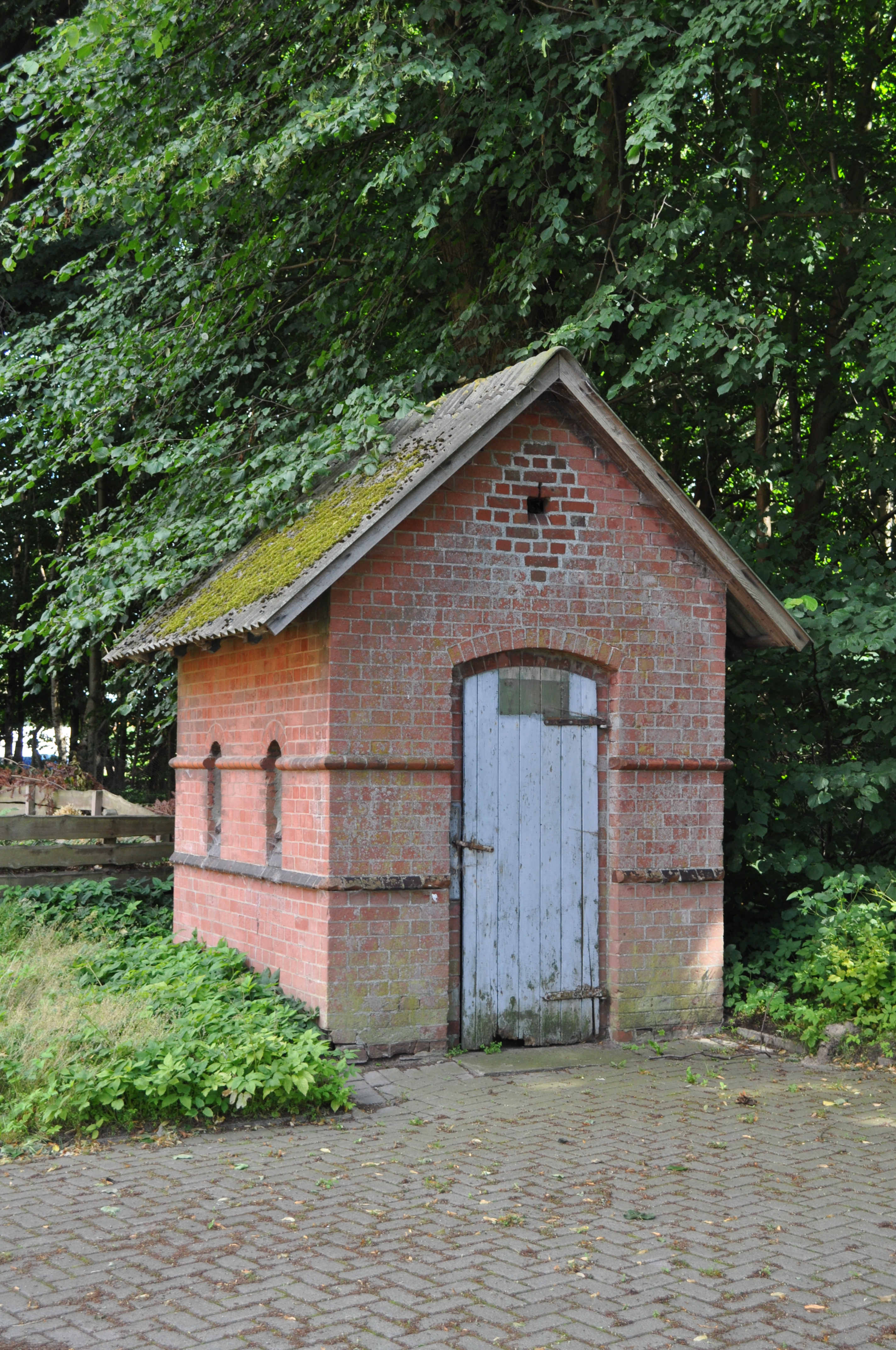 Ehemaliges Toilettenhäuschen bei der Christuskirche in Hemmoor-Warstade. This is a photograph of an architectural monument. .202.200.018